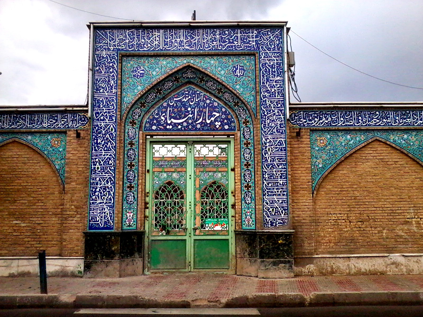 سر در آستان مقدس چهار انبیا در قزوین